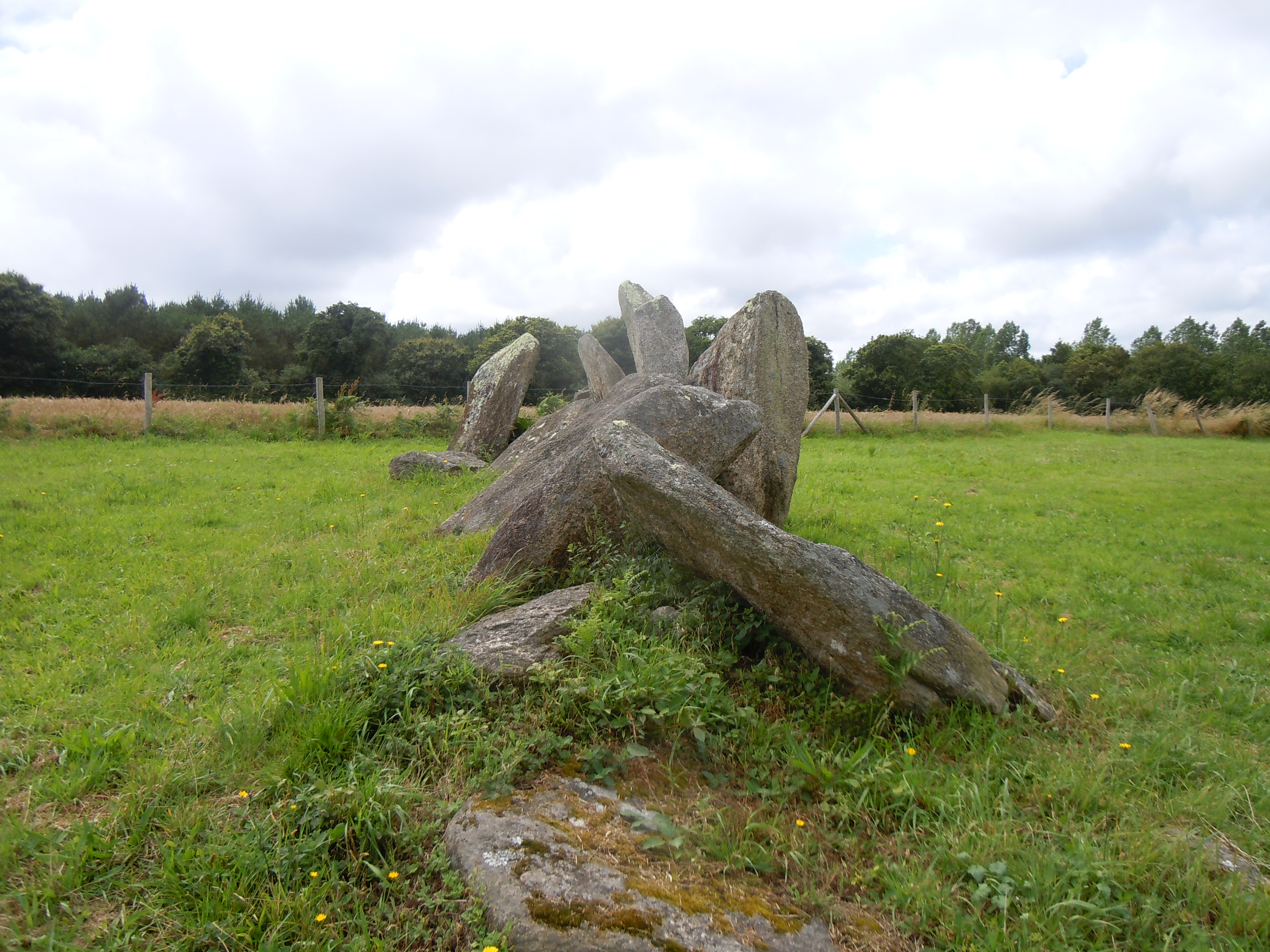 allée couverte arc-boutée de Kerantiec en Riec-sur-Bélon, Finistère, Bretagne.